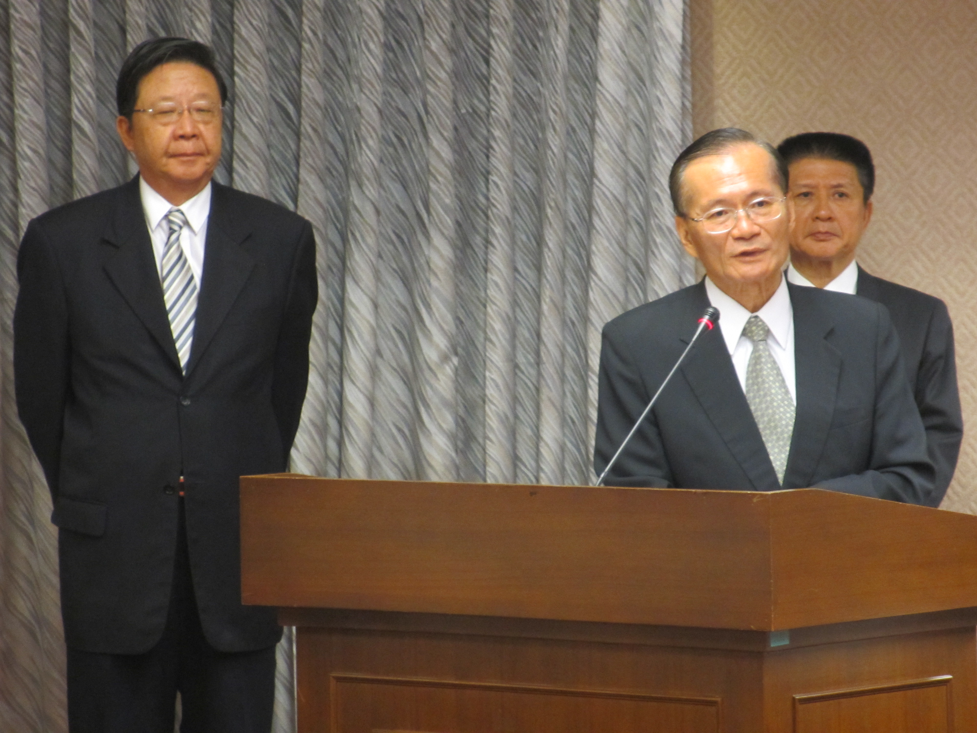 行政院海岸巡防署署長王進旺（中立者）在立法院接受質詢。